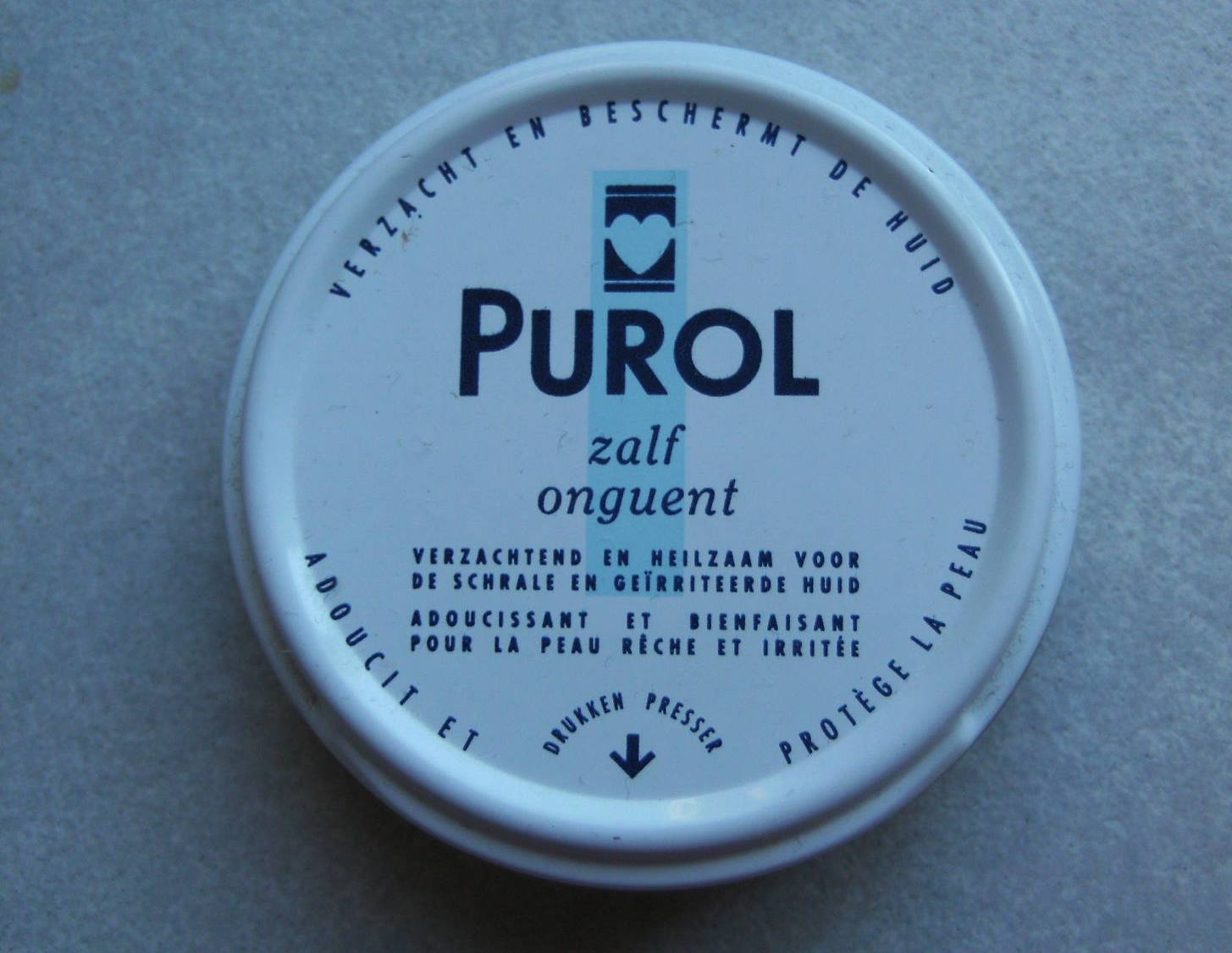 Blikje met 50 ml Purol zalf